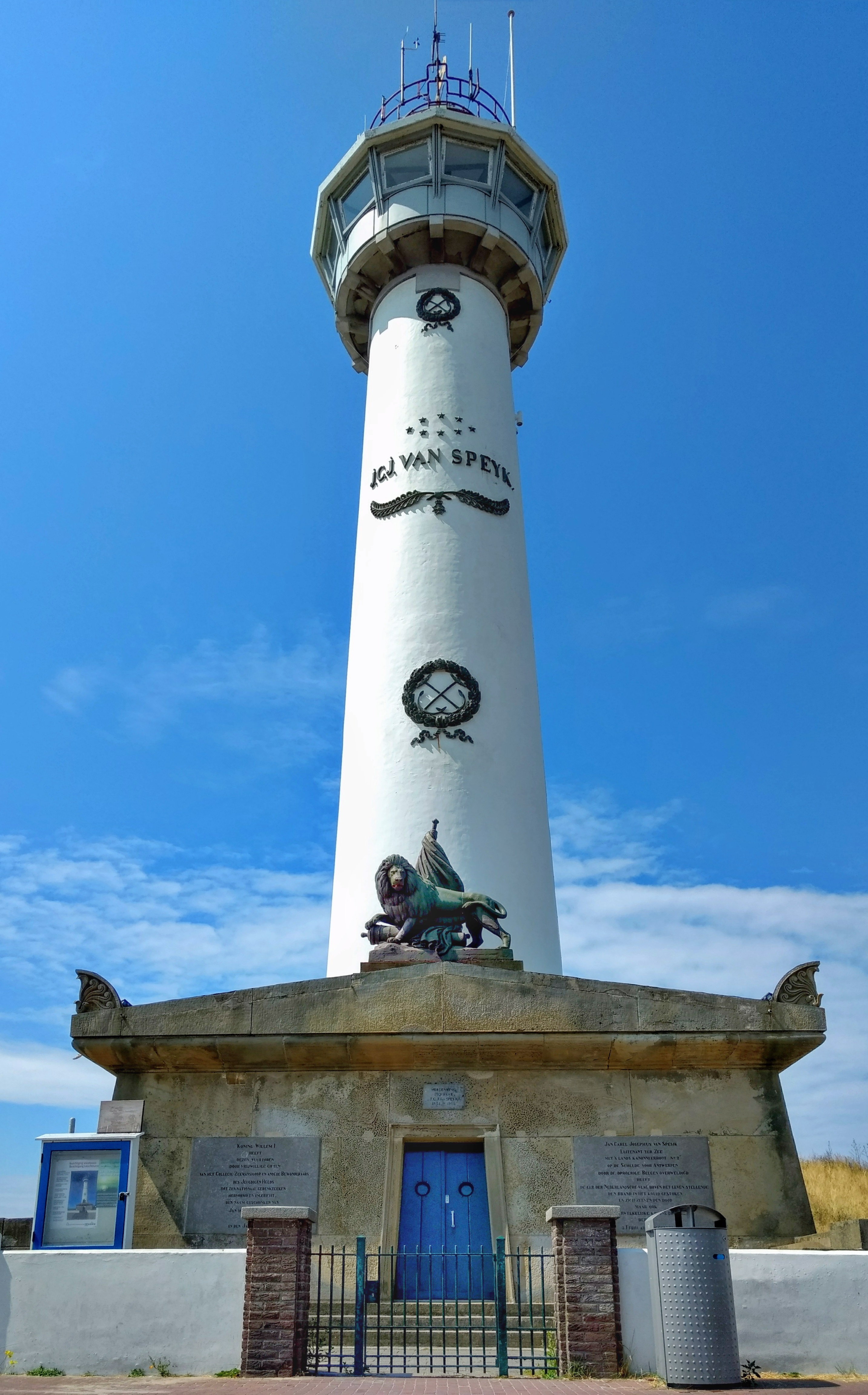 Egmond aan Zee